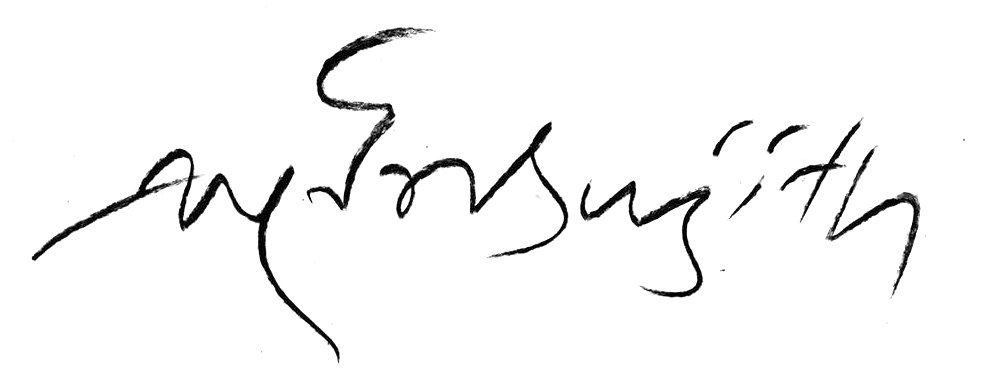 සිංහල: සුජිත් රත්නායකගේ අත්සන 2018 දී